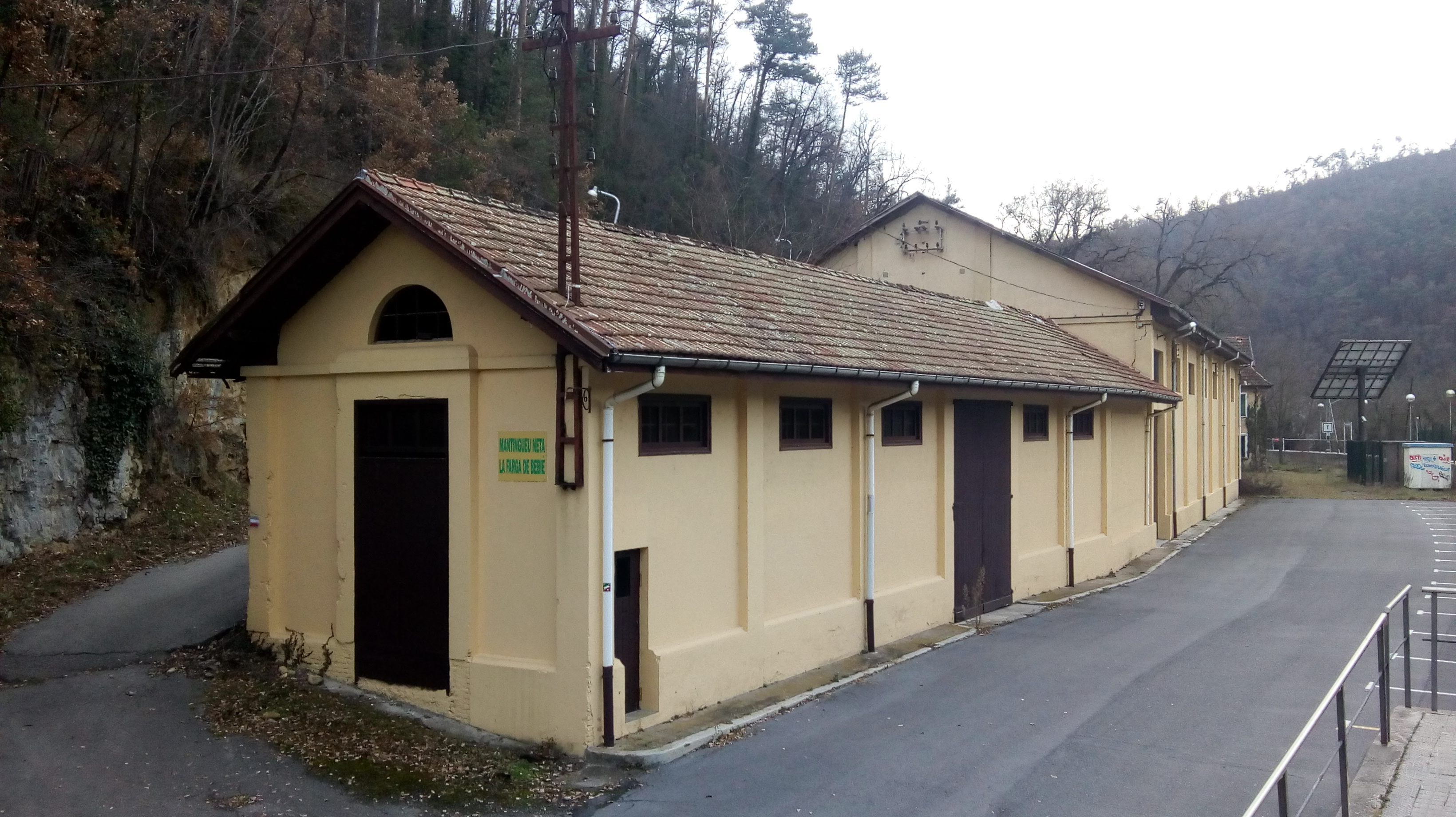 Edificio en la estación de La Farga de Bebié